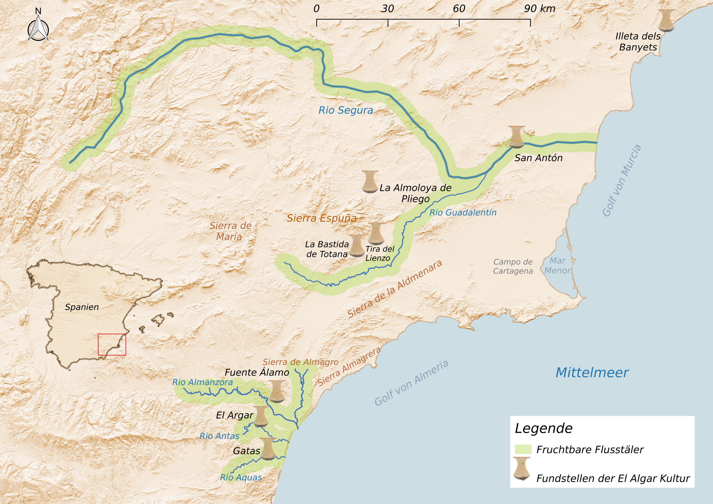 Archäologische Fundstellen der El-Argar Kultur